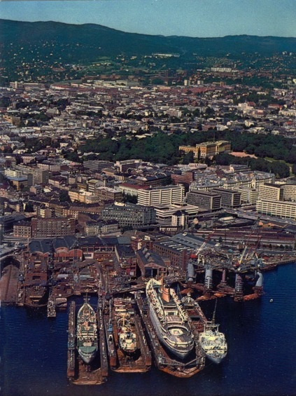 Akers mek. Verksted, med tørrdokker og oljeplattform under bygging. Avfotografert postkort.